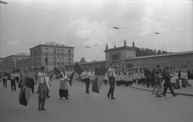 Fronleichnamsprozession in München